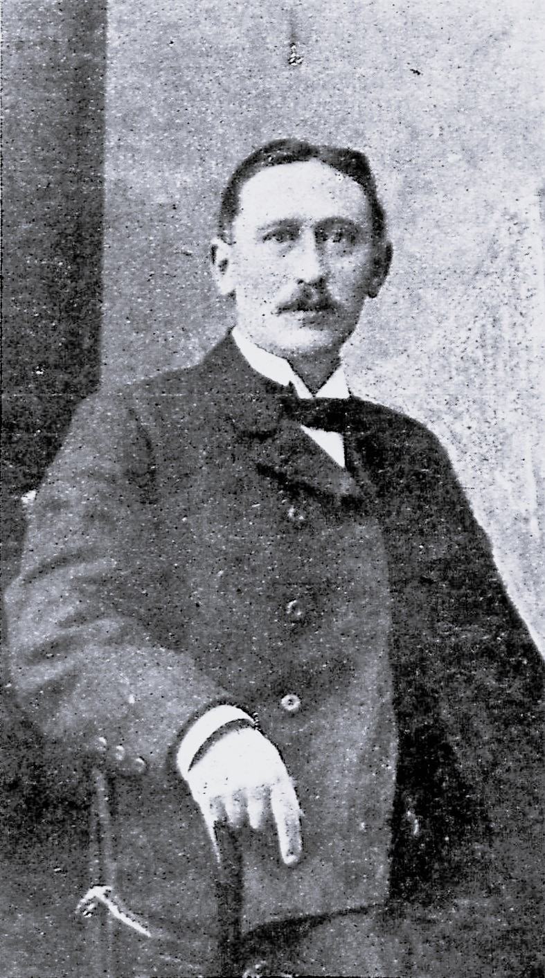 Friedhofsinspektor August Langenbuch.